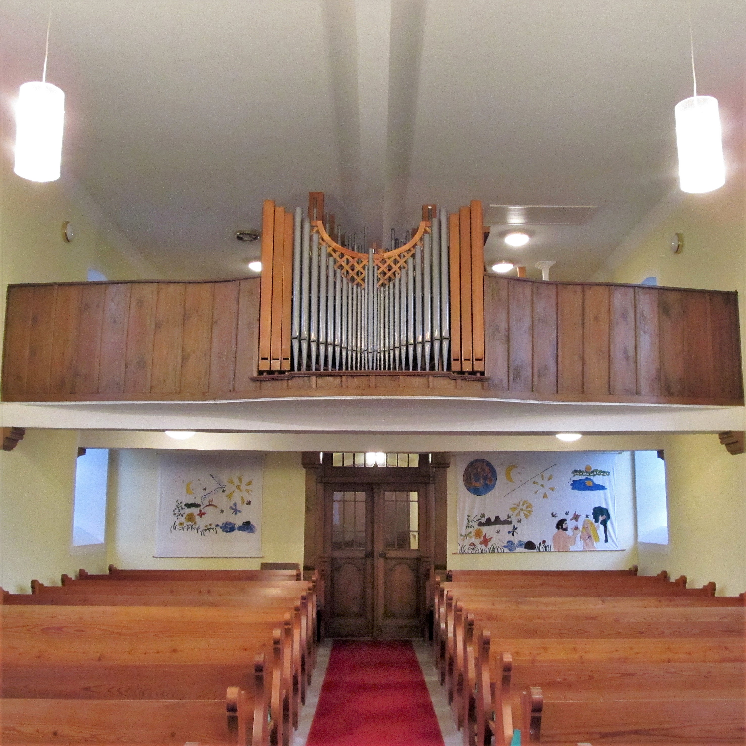 Blick ins Innere der protestantischen Kirche in Breitfurt, einem Stadtteil von Blieskastel, Saarland